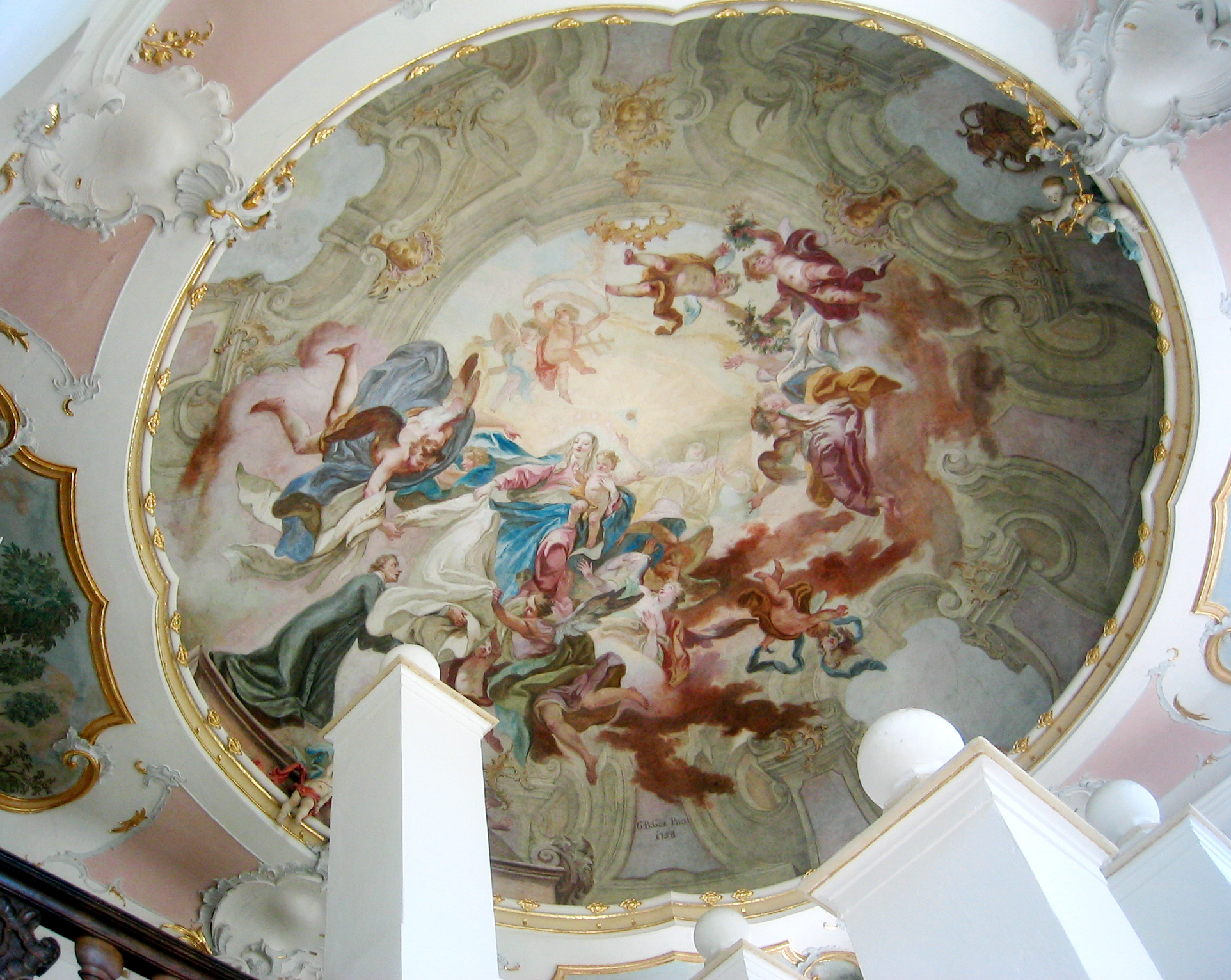 Bad Schussenried, Kloster Schussenried, östliches Treppenhaus des Neuen Klosters, Deckengemälde von Gottfried Bernhard Göz